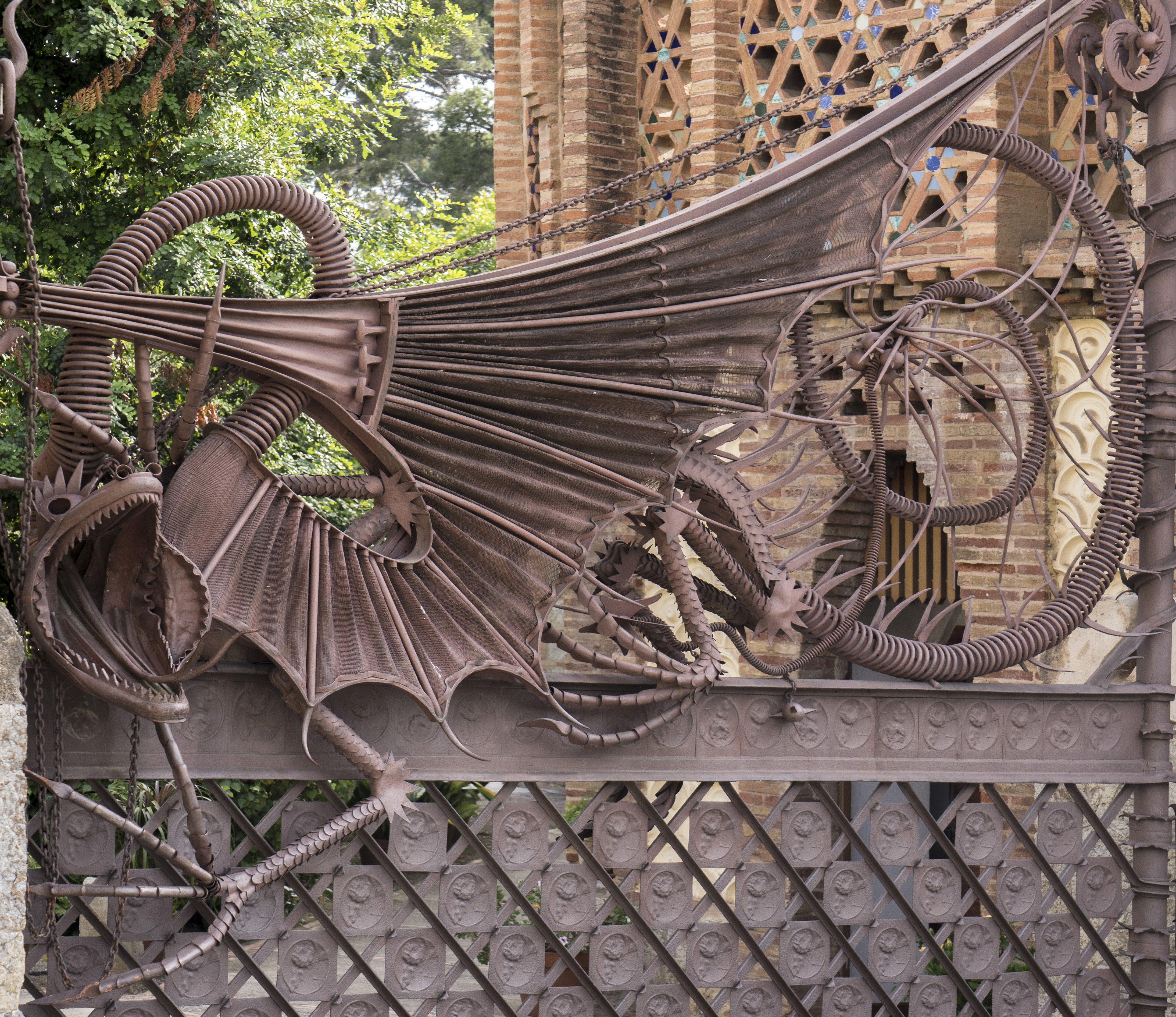 Dragon gate at Pavellons Güell, Antoni Gaudi